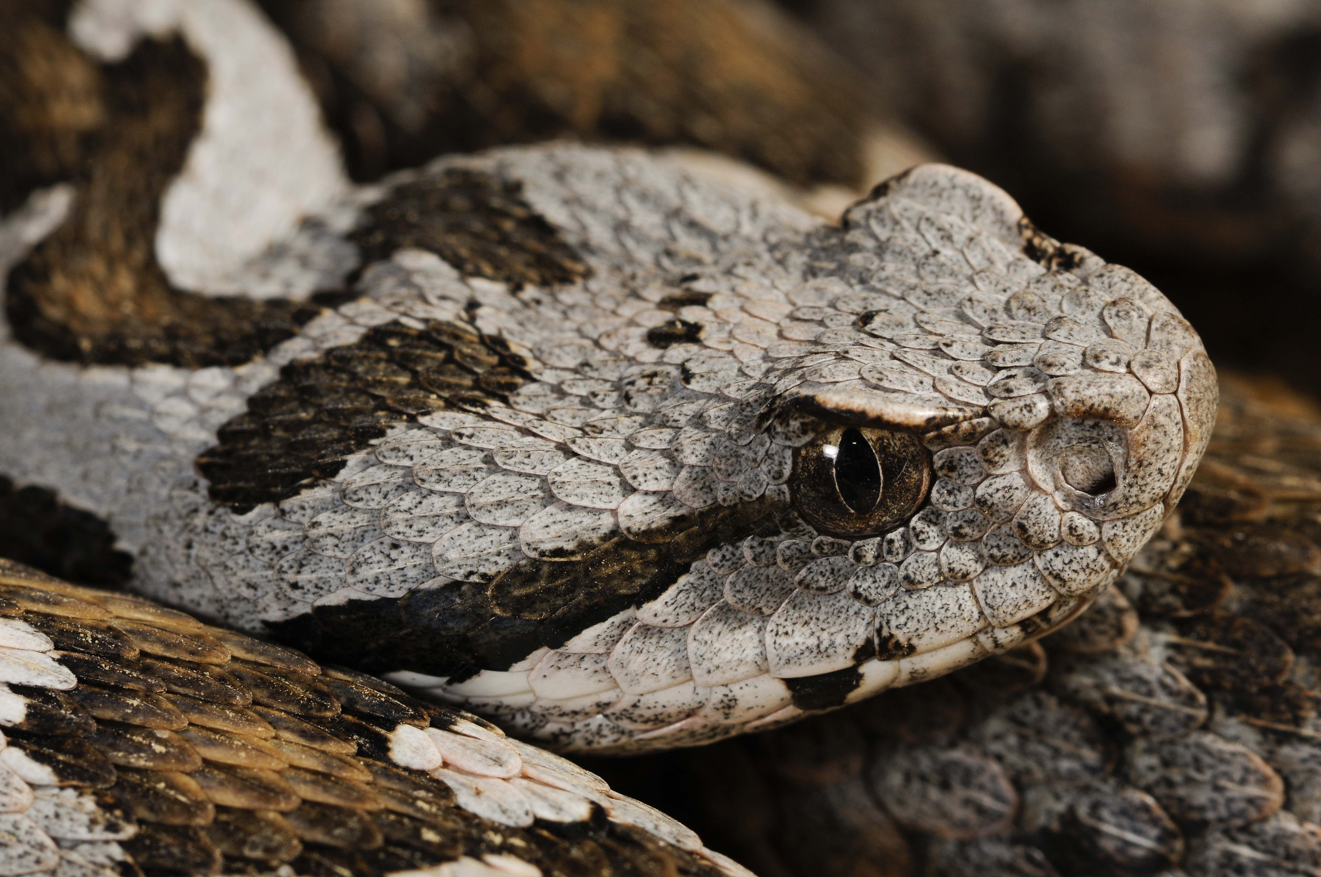 Portrait einer Kleinasiatischen Bergotter aus Griechenland